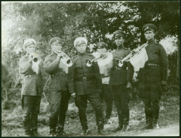 Снимка на Дико Илиев с музиканти от 36-ти пехотен козлодуйски полк в Югославия по време на Втората световна война.